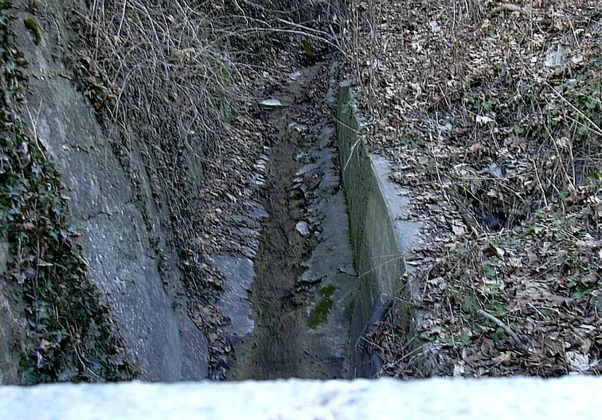 Weiherburgbach